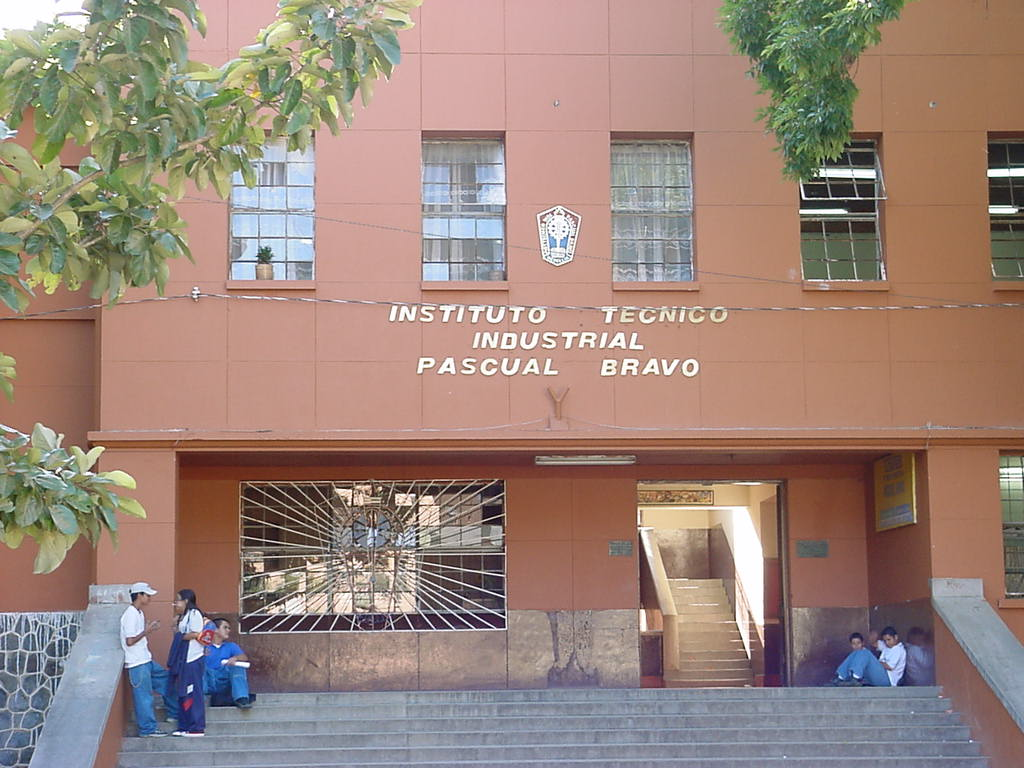 Este es el bloque académico del bachillerato pascualino.